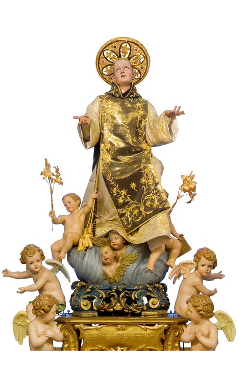 Statua lignea di San Cono da Teggiano,opera di Andrea Venuta, Cattedrale di Santa Maria Maggiore,Teggiano (SA)